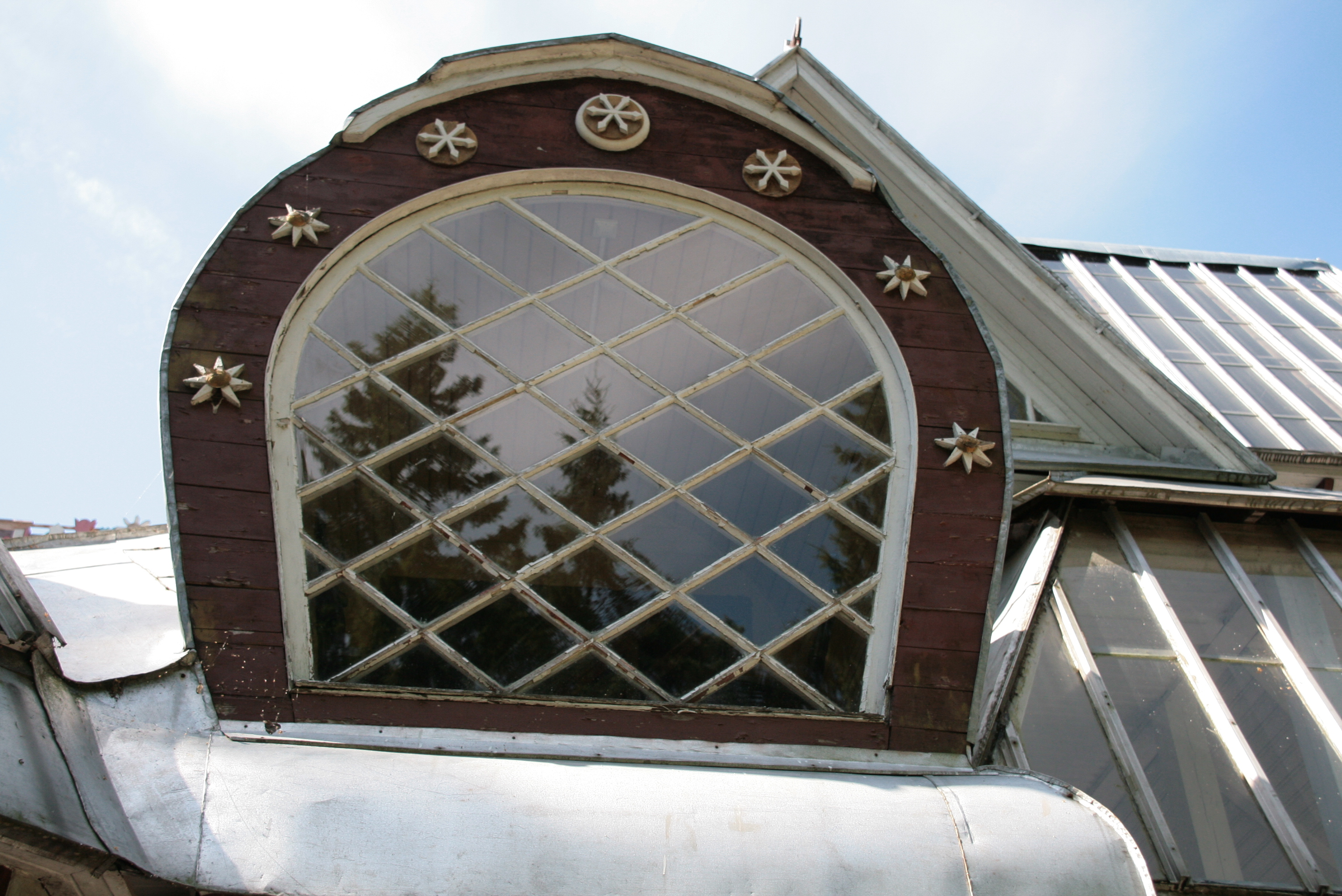 В п.Репино под СПб в усадьбе "Пенаты" окно в доме построенном И.Е.Репиным